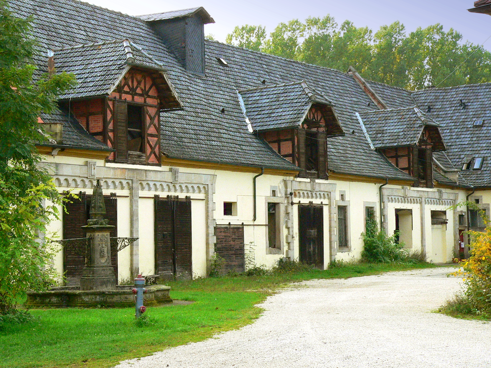 Schloss Eyrichshof bei Ebern (Bayern), Remisen